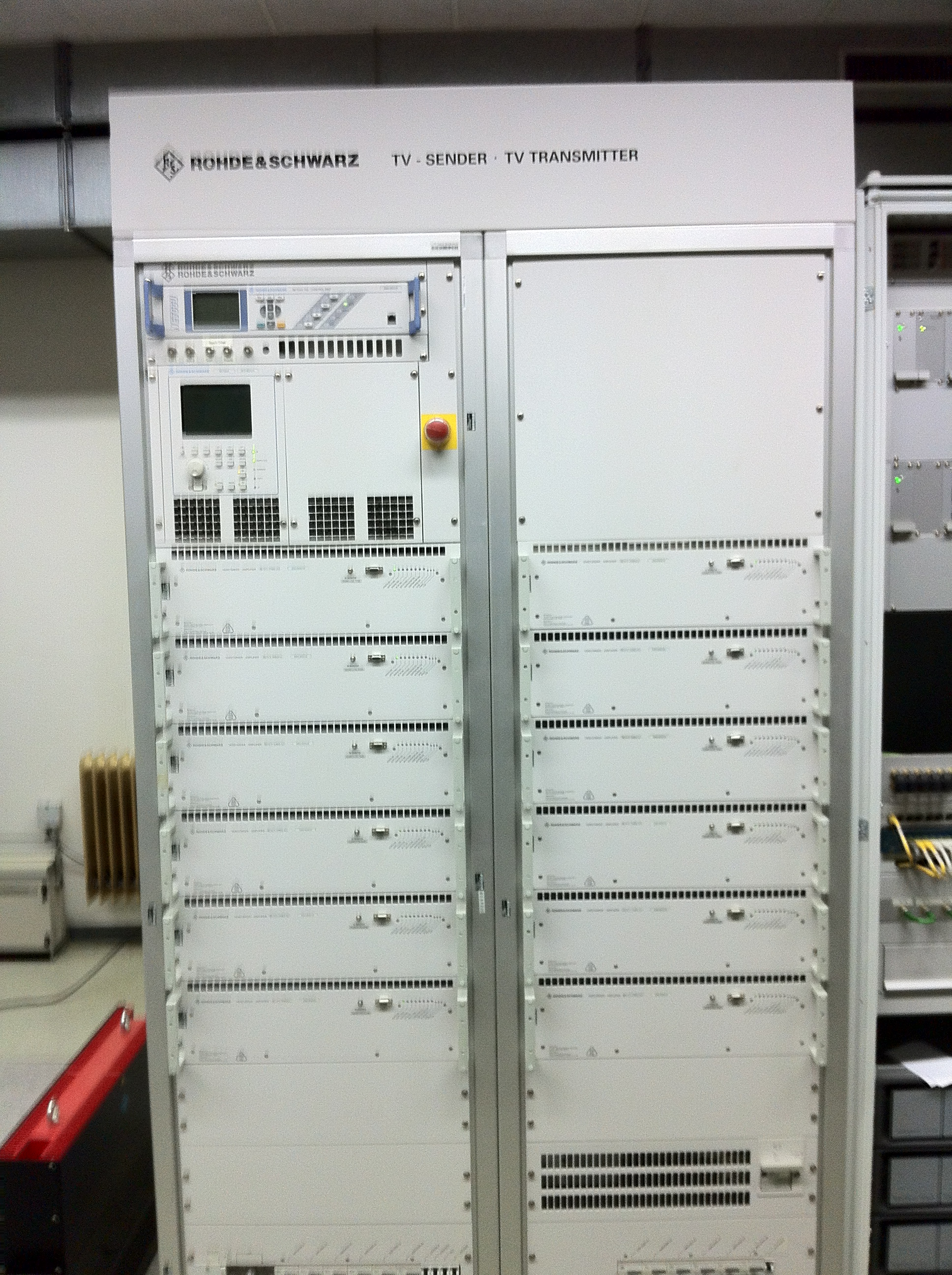 Vorderansicht der digitalen Sendeendstufen des Radiosenders "Schleptruper Egge"